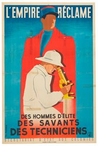 Affiche illustrée émanant du secrétariat d'Etat aux Colonies pour le recrutement de militaires, de savants et de techniciens dans les colonies. Représente un militaire avec un képi et un savant avec un casque colonial penché sur son microscope. Signée par Pierre Fix-Masseau. Editée par l'édition du secrétariat général de l'Information. Sans lieu ni date (dates extrêmes 1940-1944).